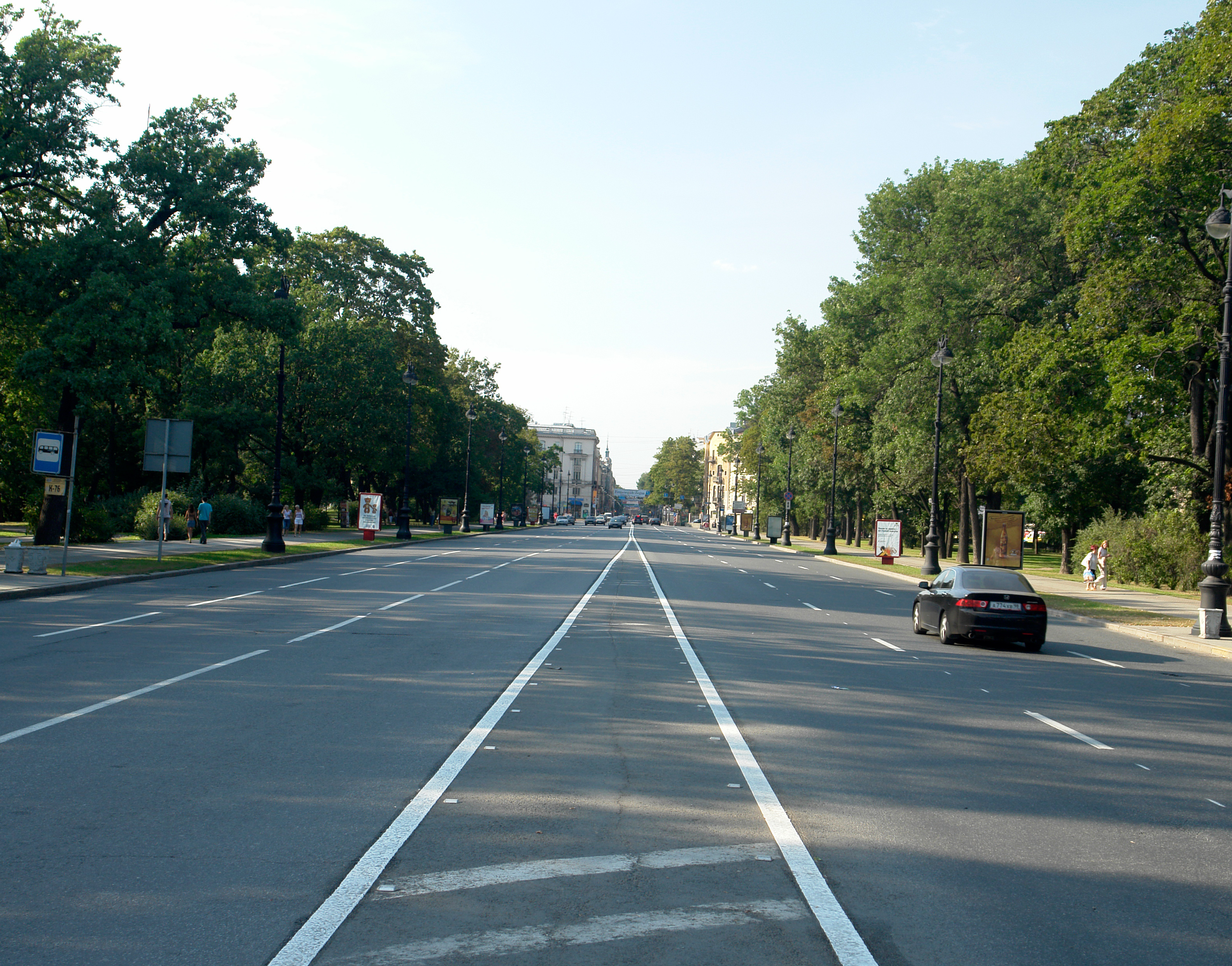 Каменноостровский проспект (Санкт-Петербург), вид с пересечения с ул. Куйбышева в сторону Австрийской площади.